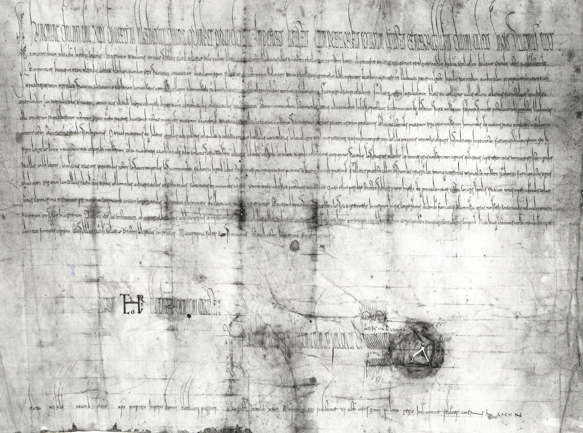 21 octobre 843 - Lothaire Ier confirme les dispositions prises par ses prédécesseurs des biens situés à Lièpvre et à Salonne en faveur de l'abbaye de Saint-Denis